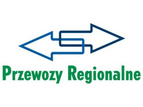 Nowe logo spółki Przewozy Regionalne